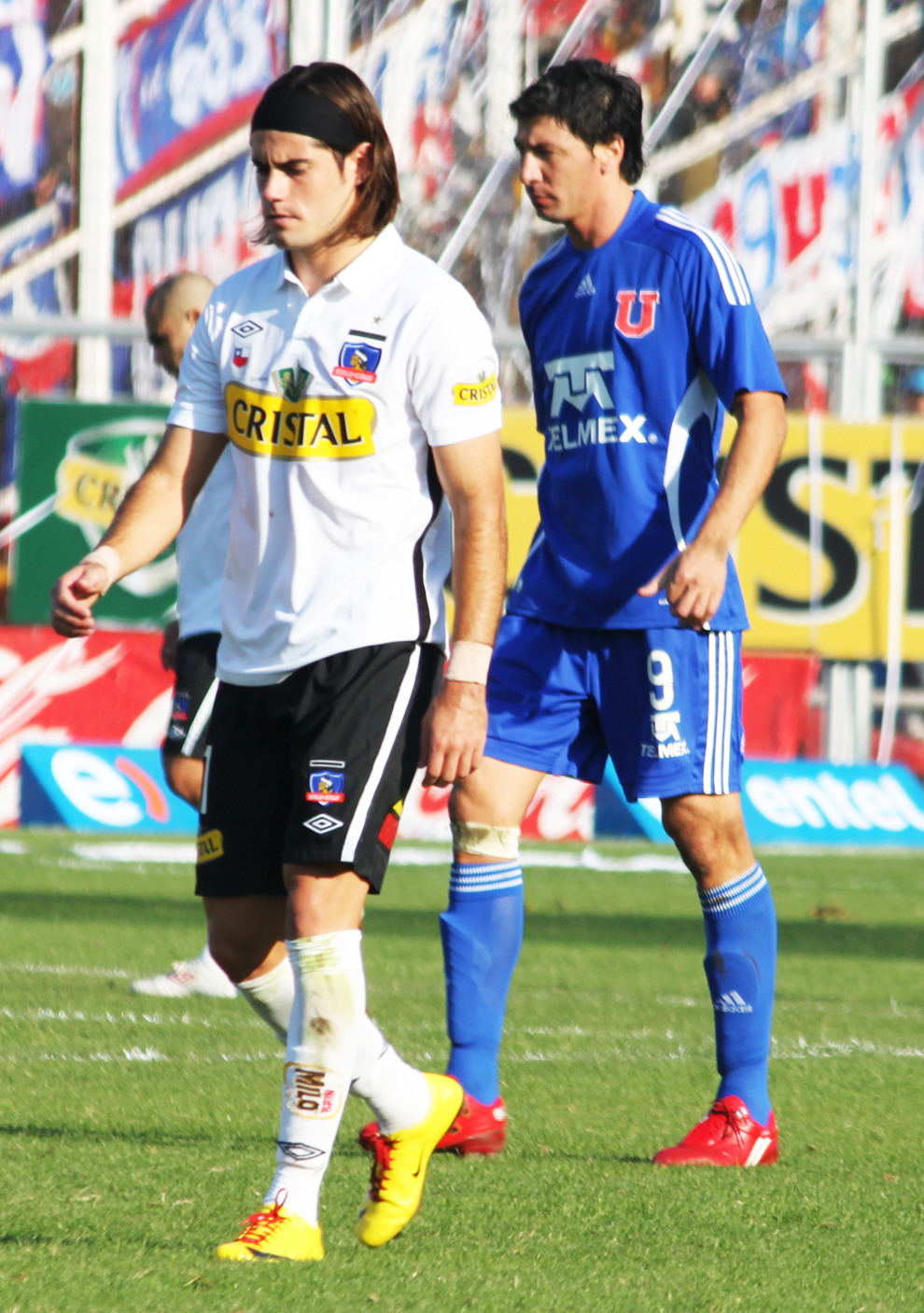 Jugador de juventus asdfghjklñ, Delantero argentino Ezequiel Miralles